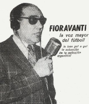 Foto de Fioravanti. Publicada en Clarín en 1970.